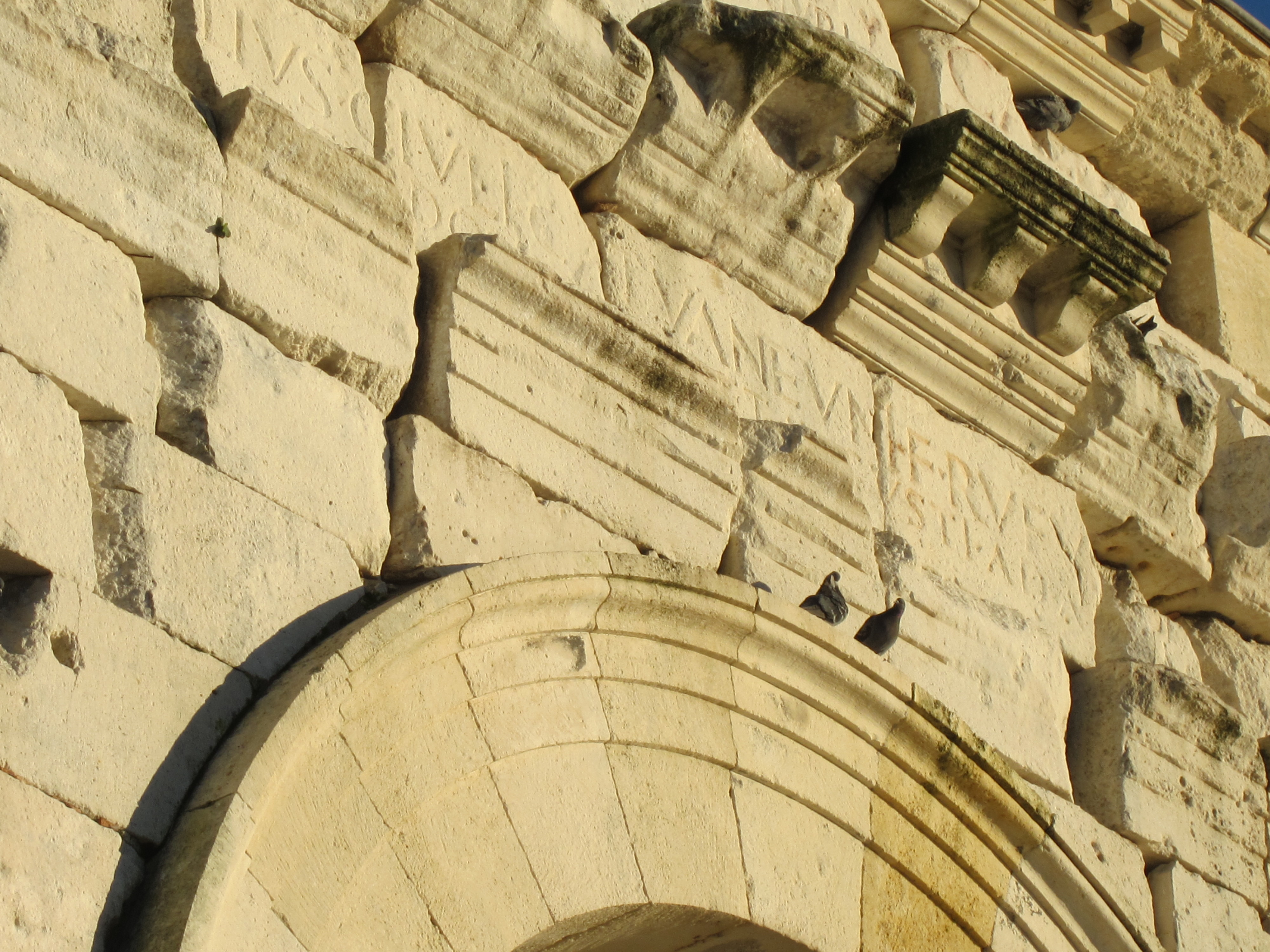 Arc de Germanicus, Saintes .